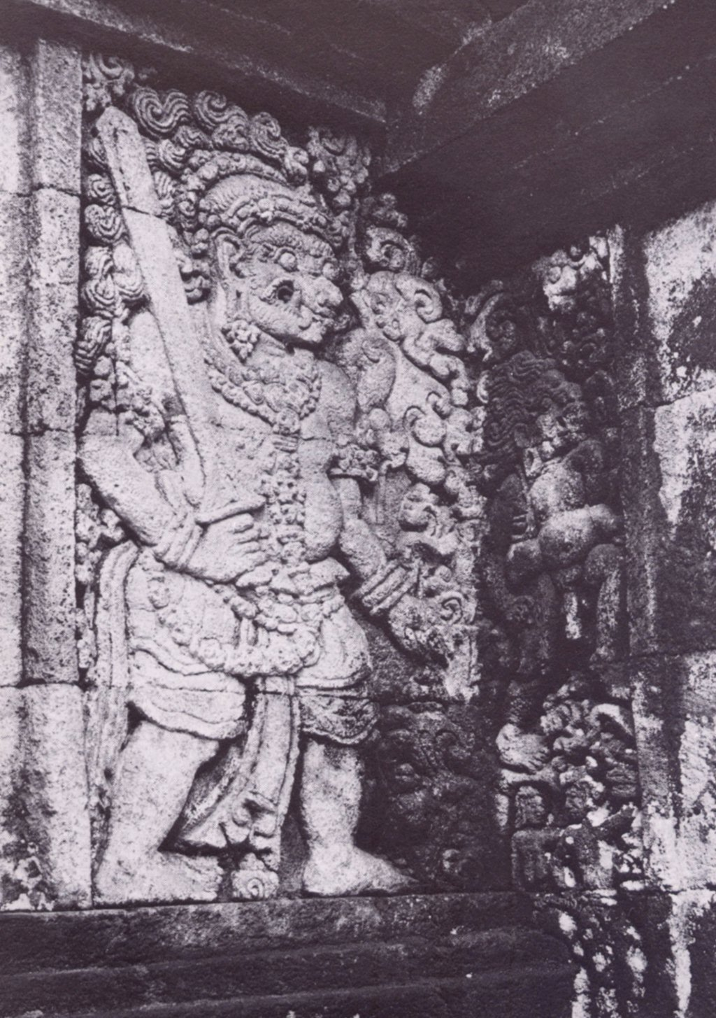 Dvarapala, Panataran temple, East Java, Indonesia